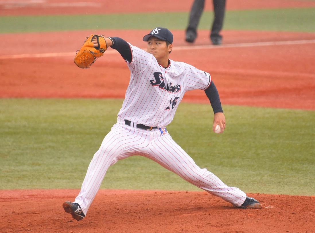 東京ヤクルトスワローズ 寺島成輝 2018年3月16日 神宮球場